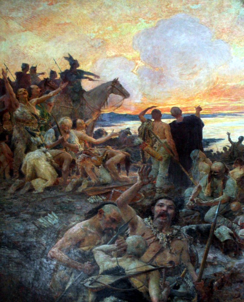 Dolazak Hrvata, rad Celestina Medovića u Hrvatskom institutu za povijest u Zagrebu